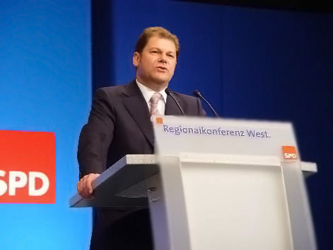 Olaf Scholz